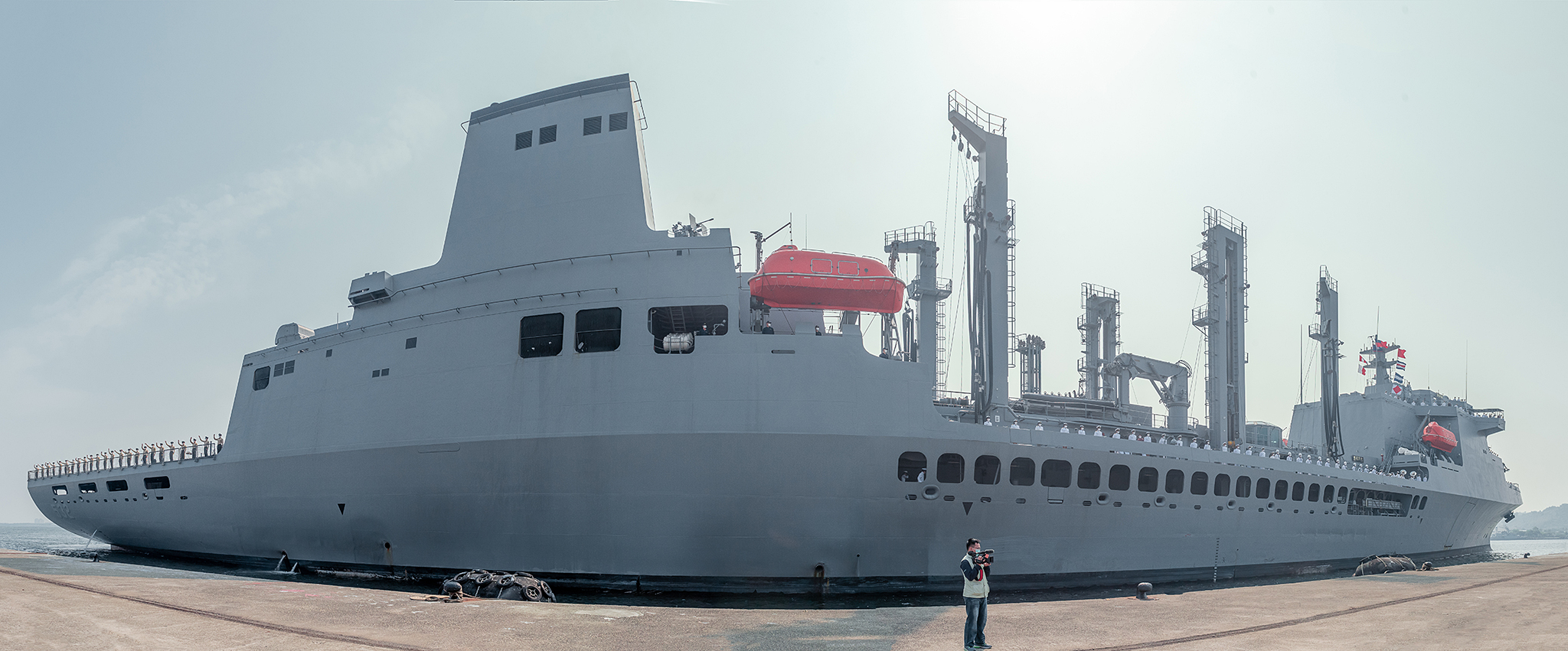 04.09 總統主持「海軍敦睦遠航訓練支隊返國歡迎儀式」